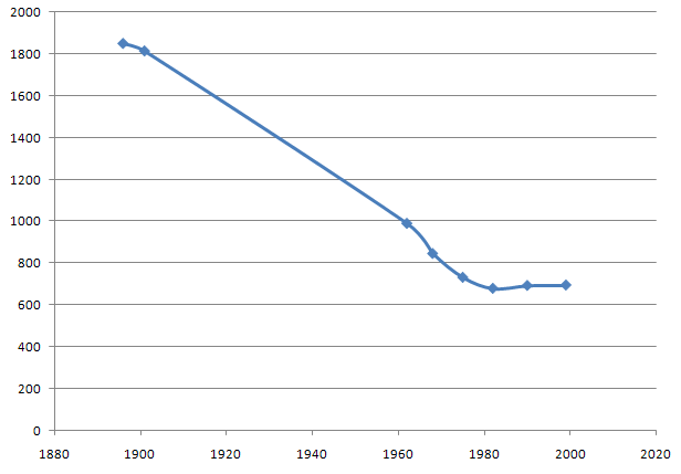 Evolution de la population à Ossès